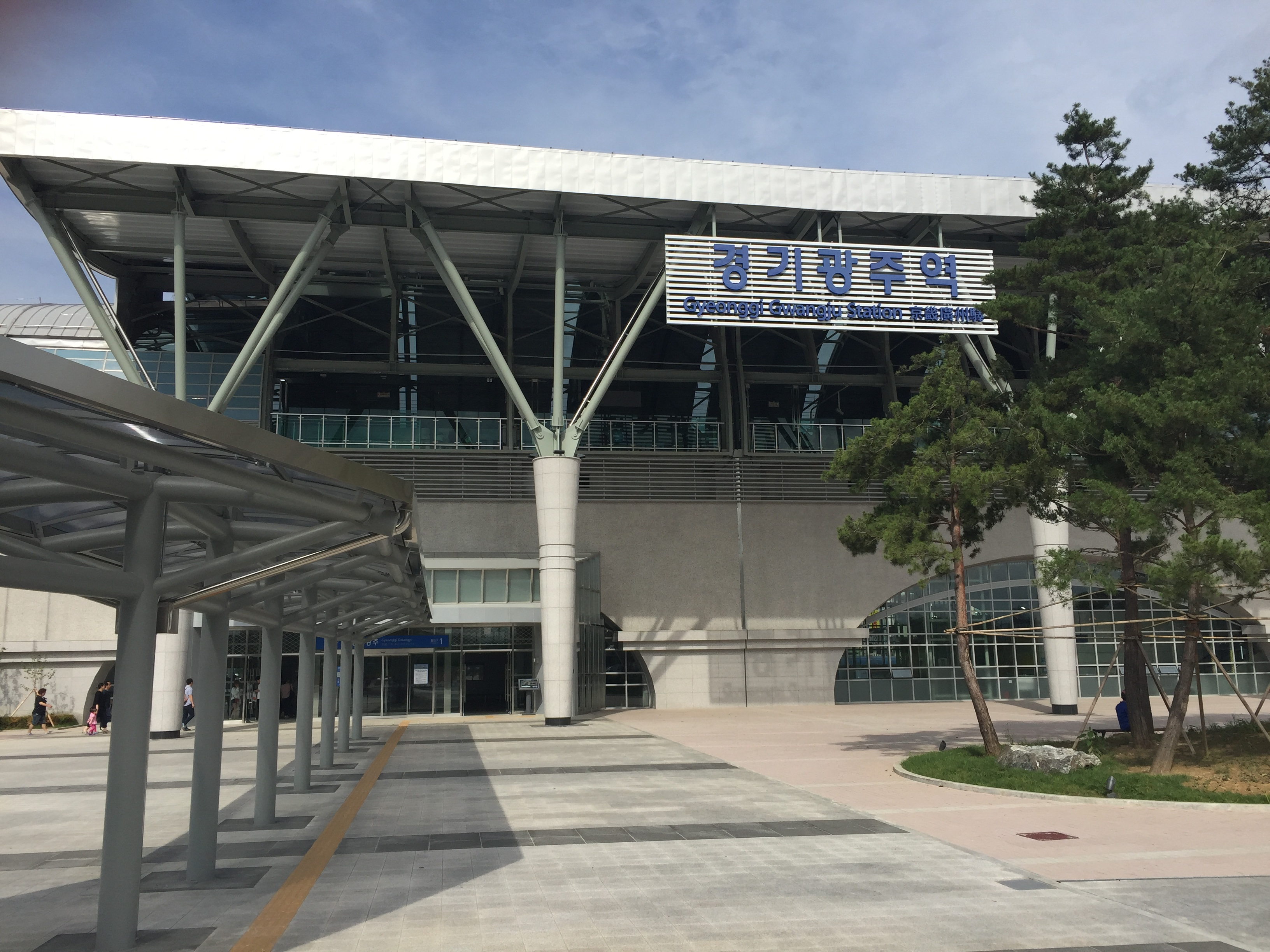 경기광주역 외관입니다.